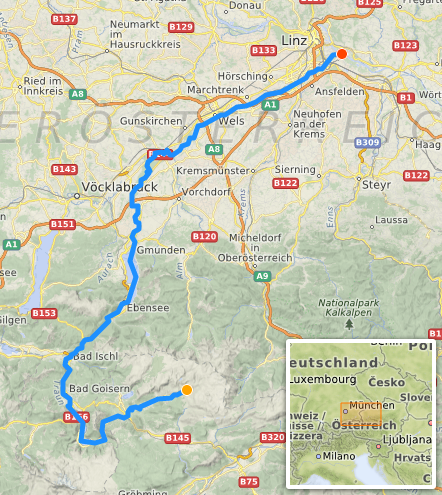 Carte d'après openstreetmap This map may be incomplete, and may contain errors. Don't rely solely on it for navigation.